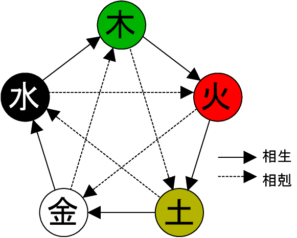 五行の図 Image:Fiveelement.JPG（用心阁氏作成、PD）を元に再構成。 Dynamic Drawにて作成。